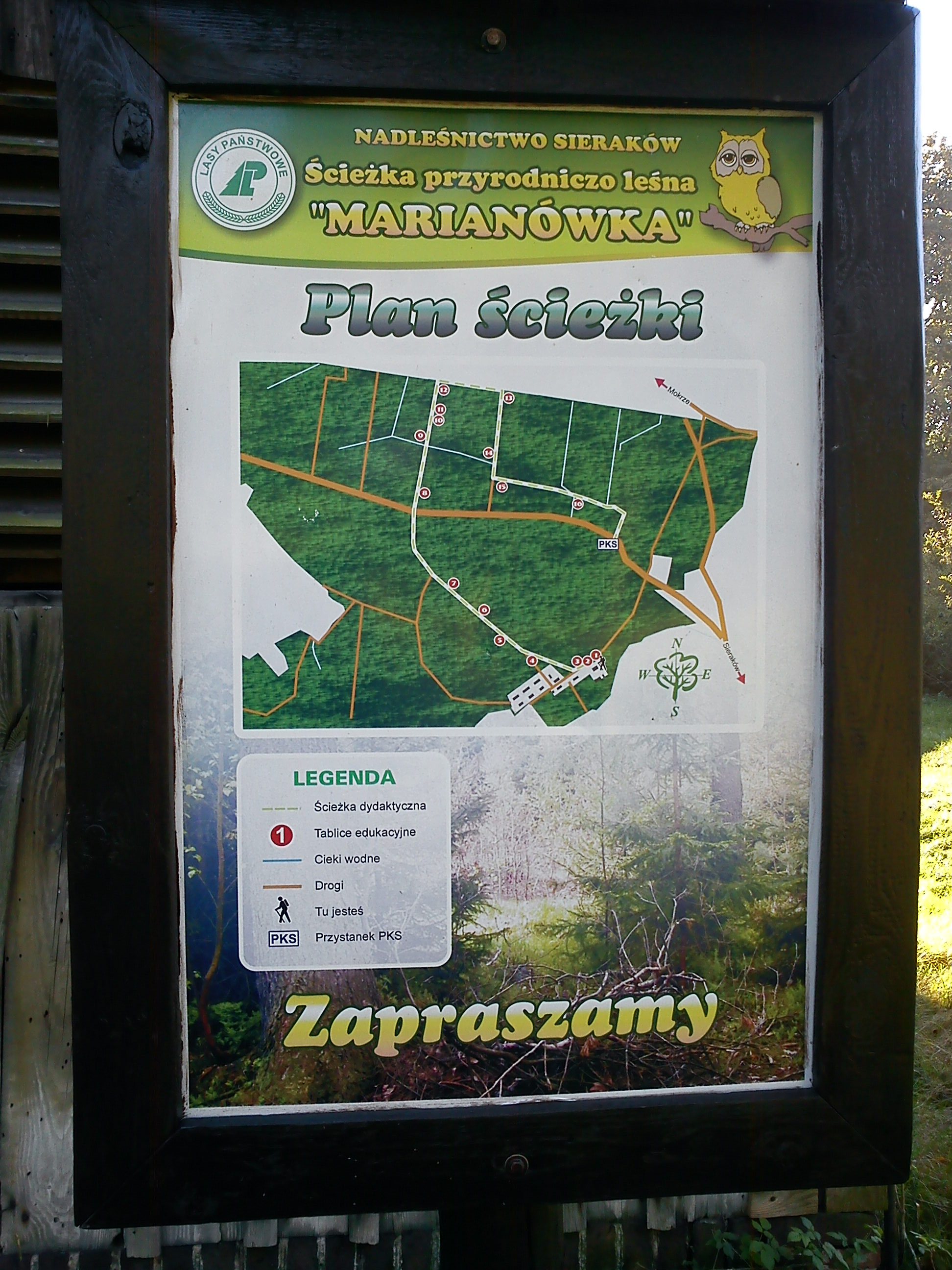 Ścieżka edukacyjna "Marianówka"